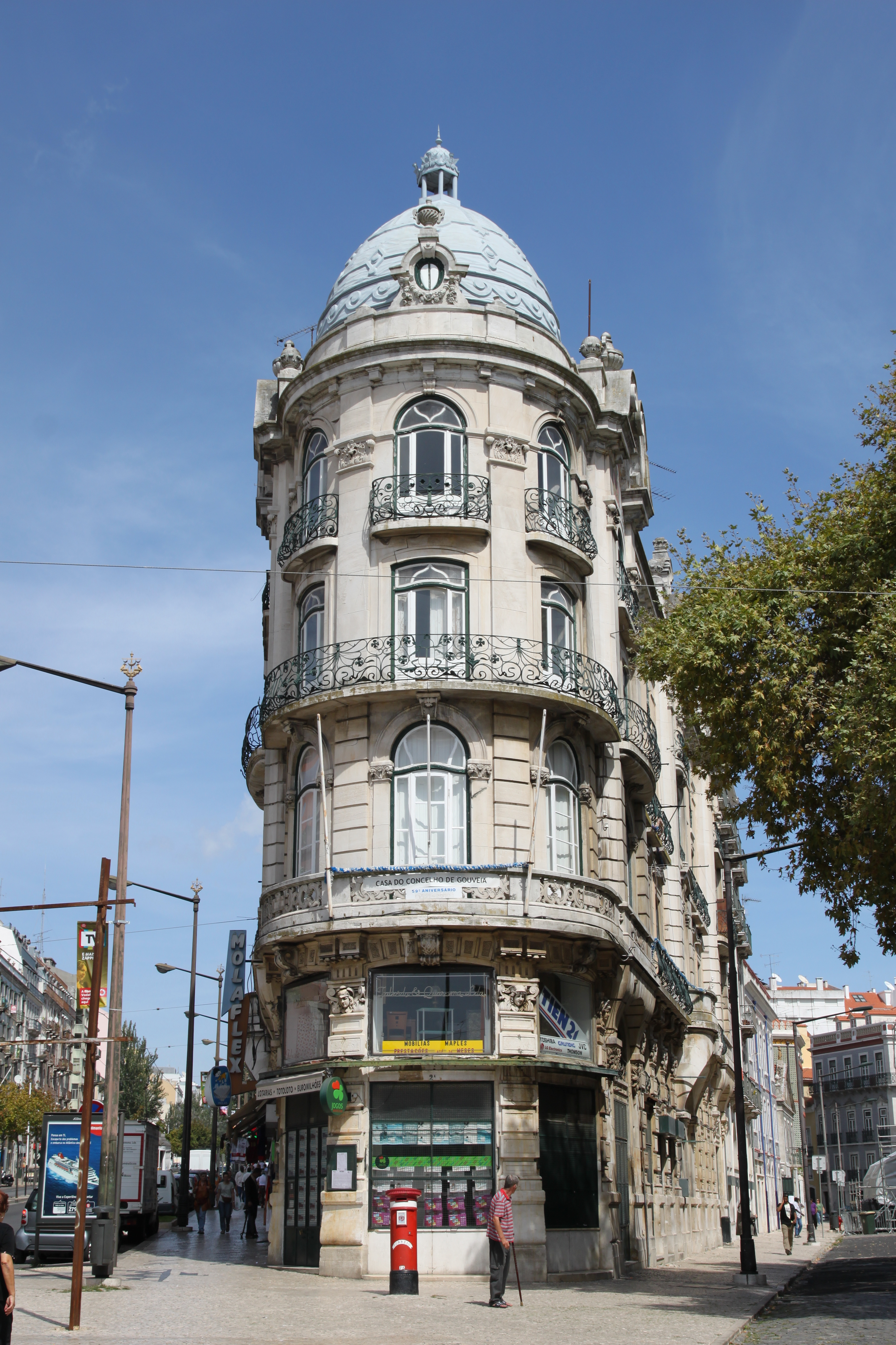 Edifício na Avenida Almirante Reis, n.º 2 a 2K